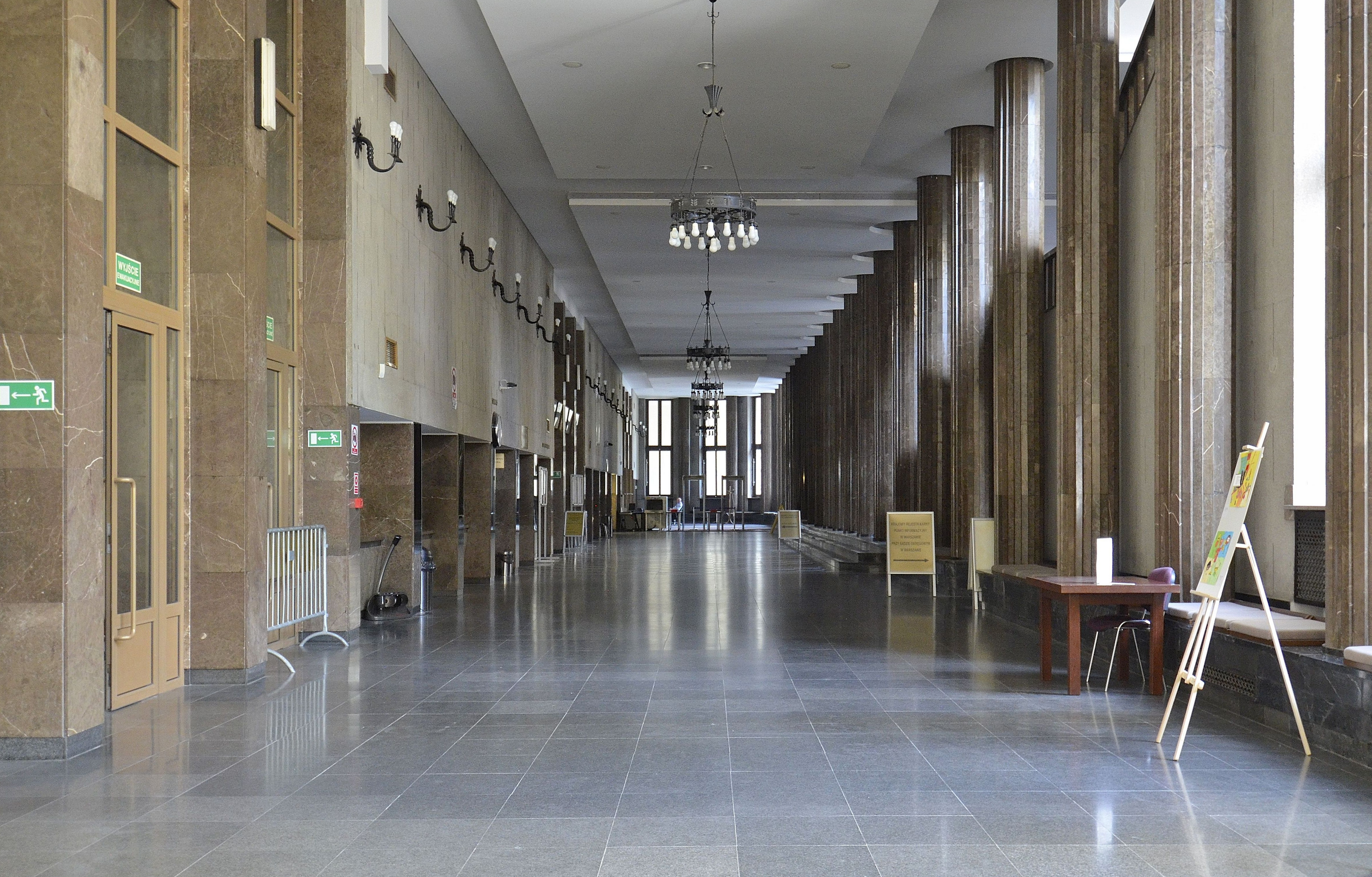 Hol główny w Sądzie Okręgowym w Warszawie (tzw. Sądy na Lesznie)